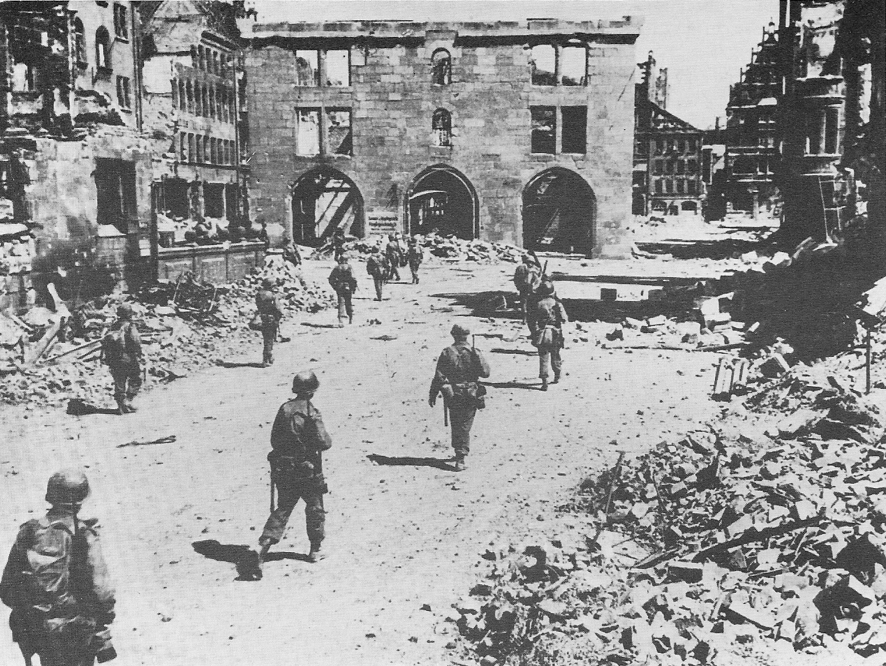 Soldaten der 3. US-Inf.-Div. (O'Daniel) während der Eroberung Nürnbergs am 20.04.1945. Photo aufgenommen an der Mauthalle.